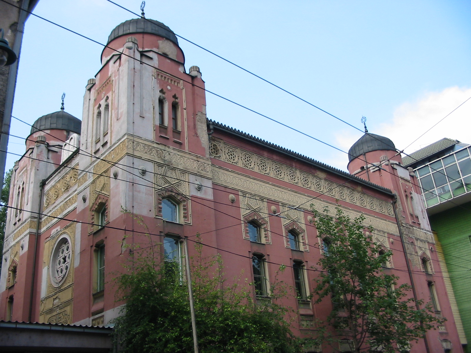 Sarajevo jewish synagogue